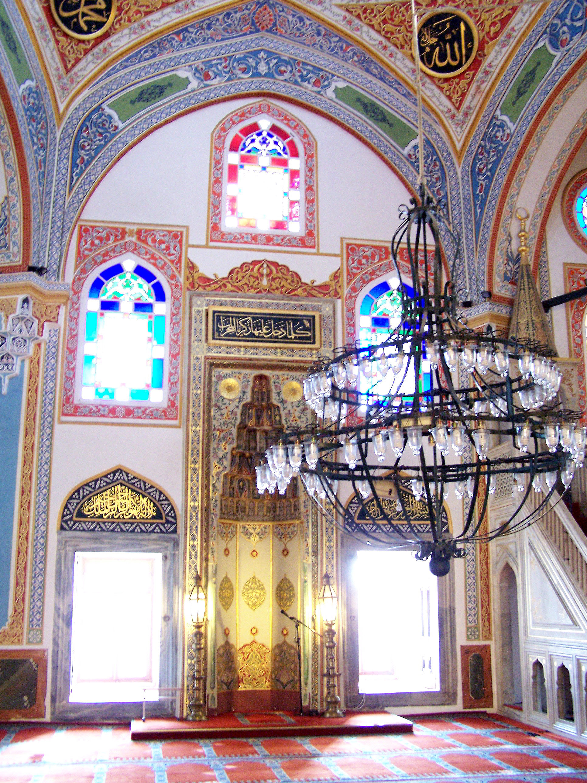 Mihrap of Sinan Paşa Camii in Beşiktaş, İstanbul, Turkey